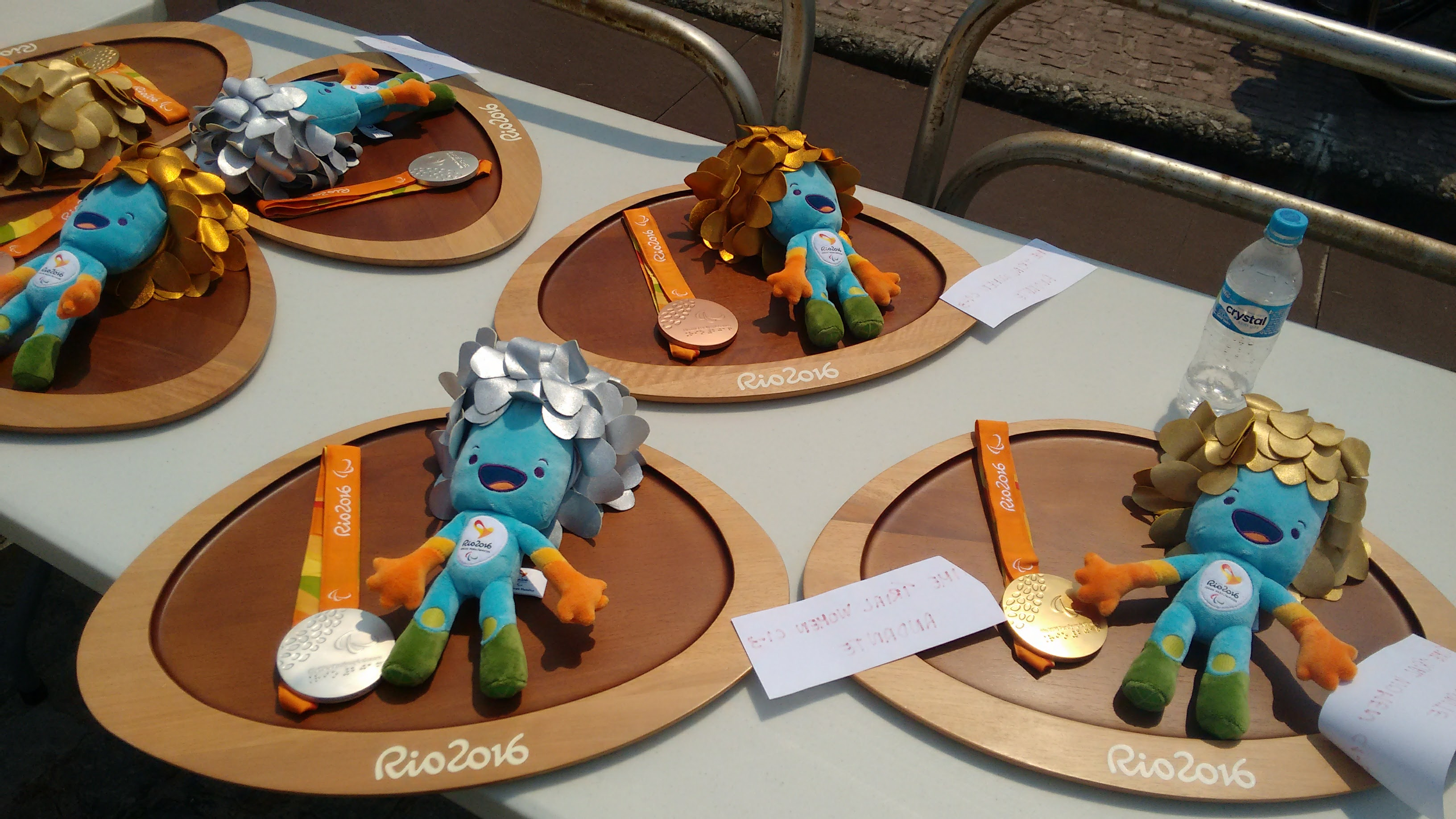 Medalhas momentos antes de serem entregues aos atletas